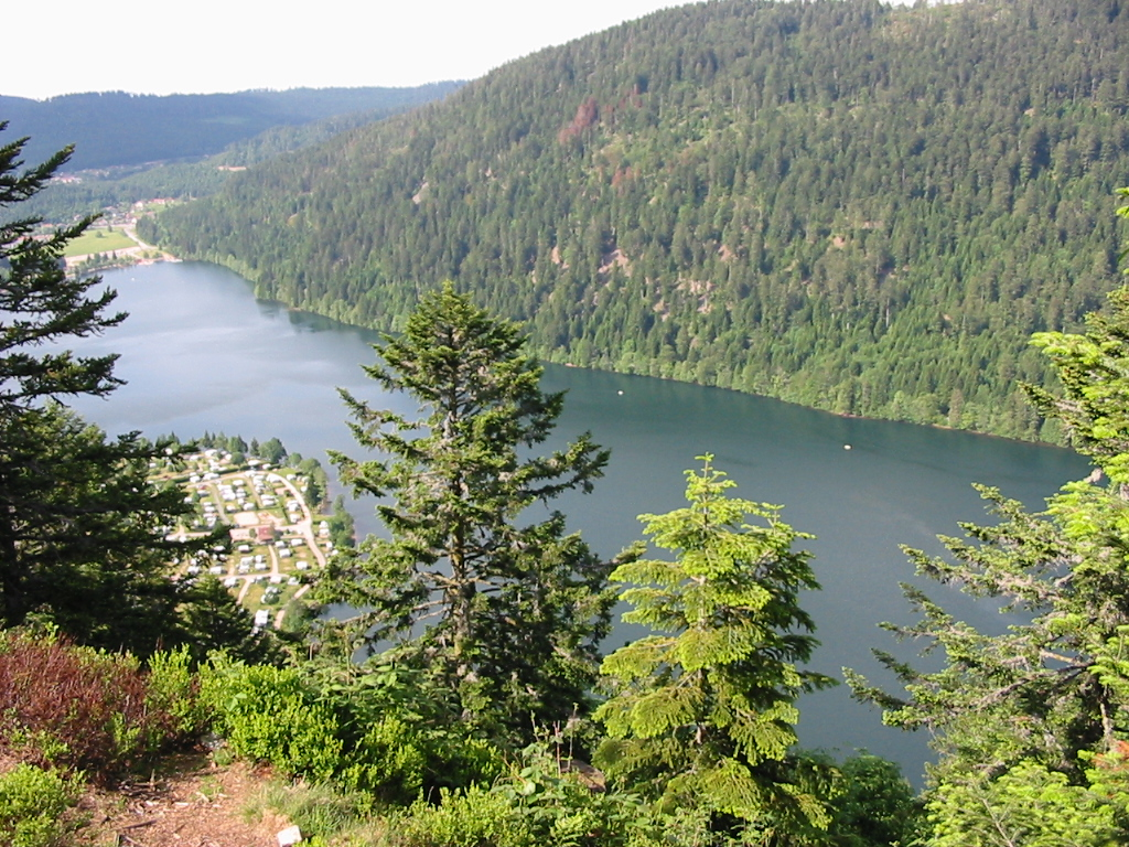 Le lac de Longemer, vu de la Roche des Vieux Chevaux (984 m). L'altitude du lac est de 736 m.